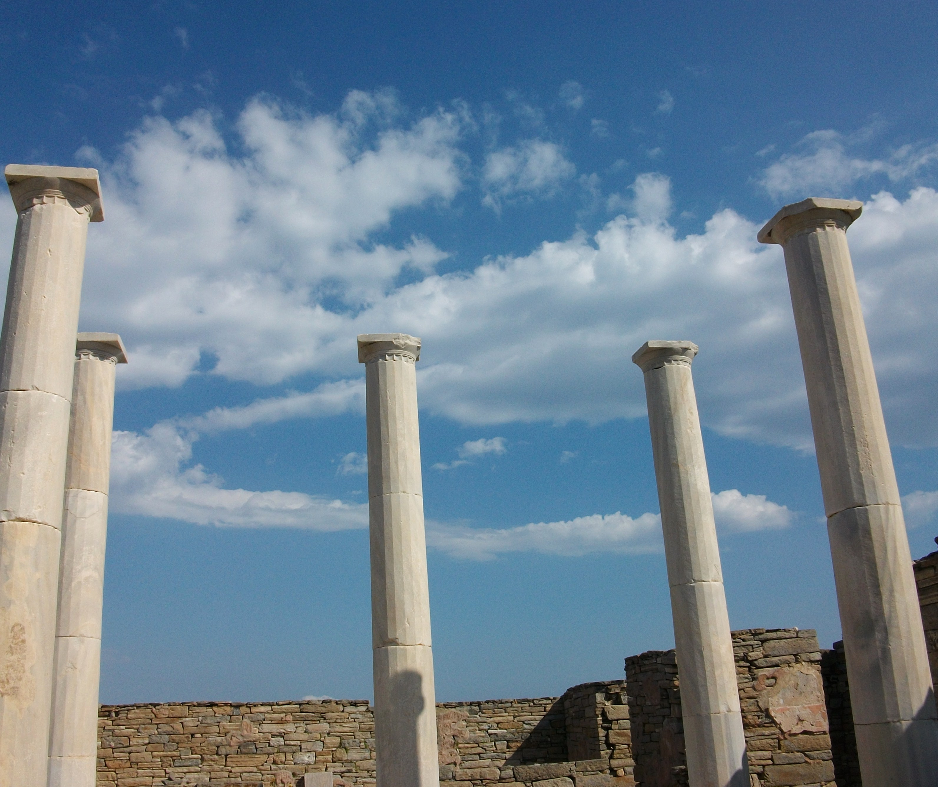 Columnes del pati de la casa de Dionís de Delos.